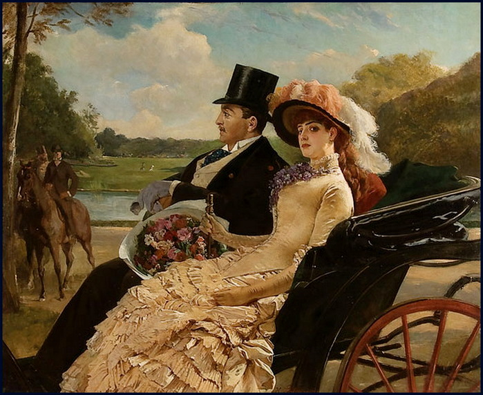 Spazierfahrt HENRI GUILLAUME SCHLESINGER (French 1814-1893) A Ride in the Park Oil on canvas Signed lower center 43.5 inches x 52.5 inches (110 x 133 cm) Estimate $18,000-$22,000 Euro 12,300-15,000 Provenance: Private collection, Wisconsin, U.S.A. Jackson's Auction Cedar Falls, IA, USA